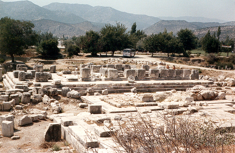 Leto-, Artemis- und Apollontempel (v.o.n.u.). Der älteste der drei Tempel, das Heiligtum der Artemis in der Bildmitte, schloss den heiligen Fels - am rechten Bildrand - in der Cella mit ein.